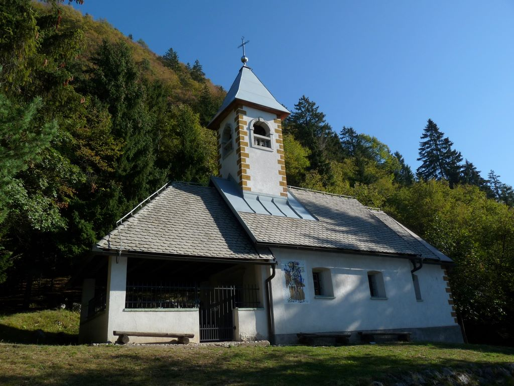 Sv. Lovrenc nad Zabreznico